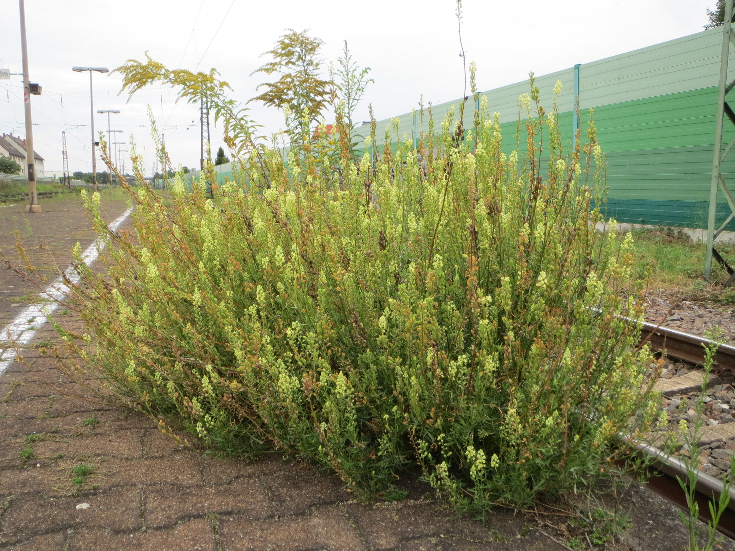 Gelber Wau (Reseda lutea) am Bahnhof Oftersheim